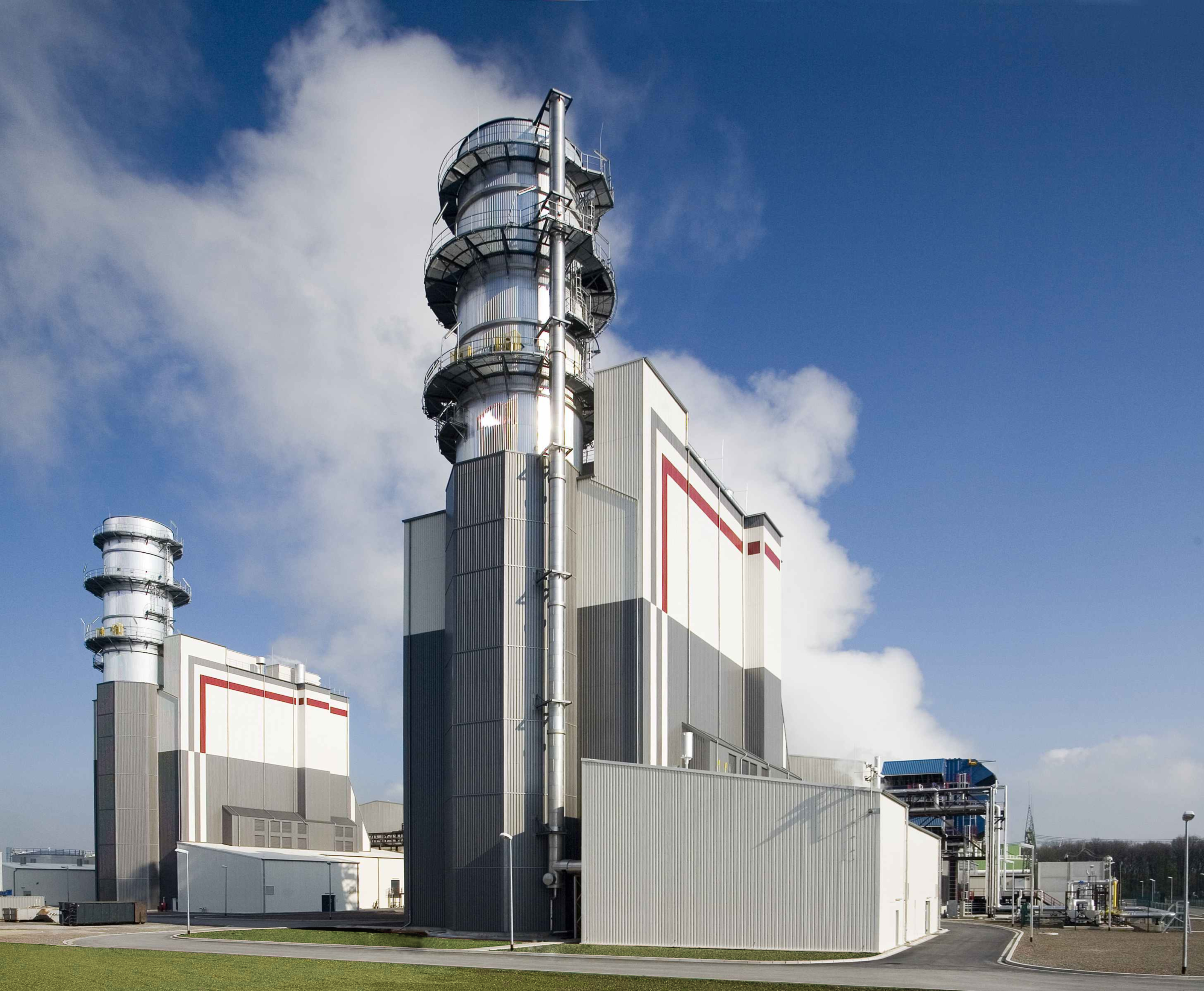 Trianel Gas- und Dampfkraftwerks, Hamm-Uentrop